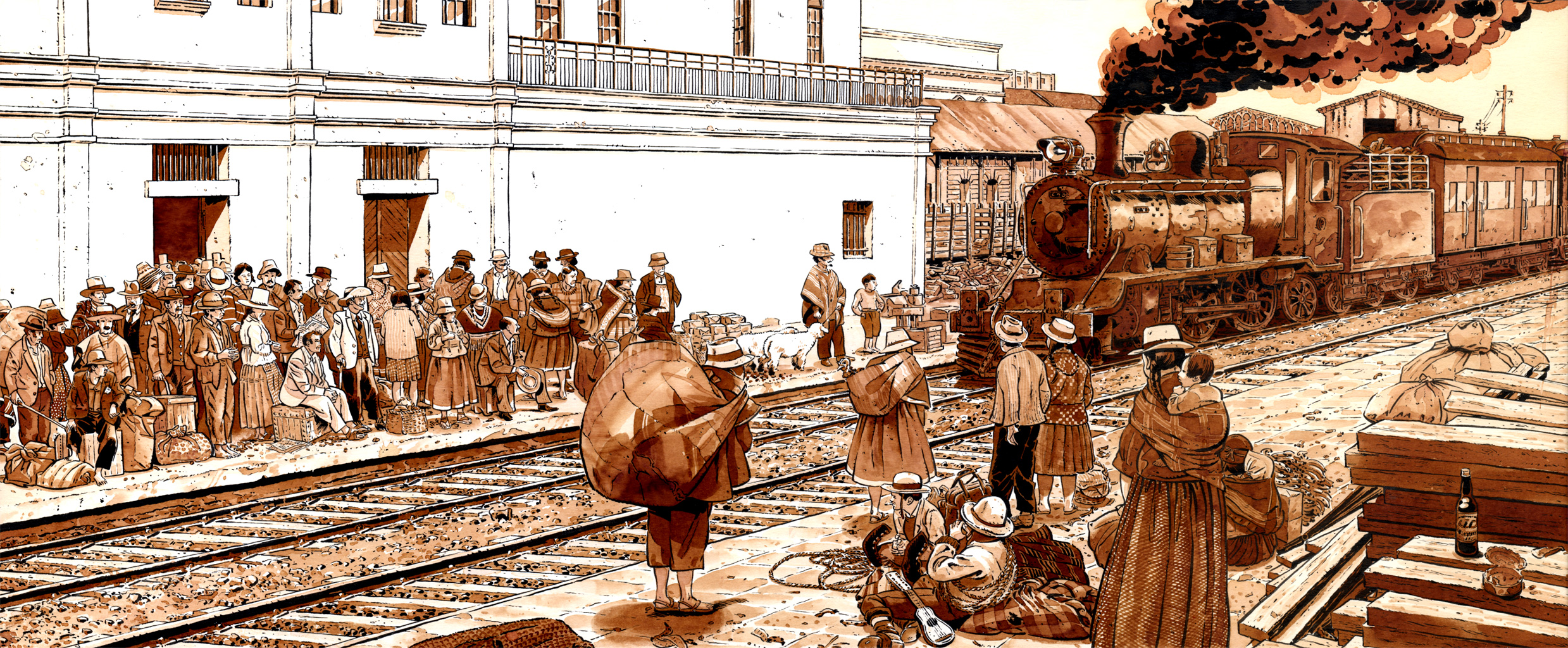 Illustration du roman BD "LE TRANSPATAGONIEN" sur un scénario de Benoit Peeters et Raoul Ruiz, édité chez Casterman en 1989.